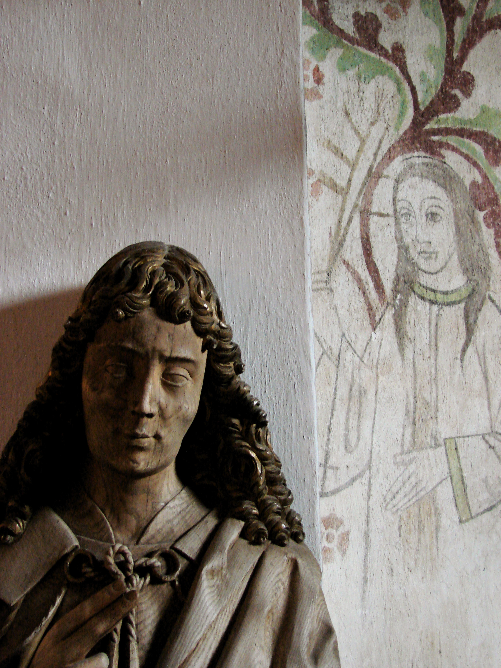 Detaljer af træskulptur og kalkmaleri fra Roskilde Domkirke, Roskilde, Sjælland